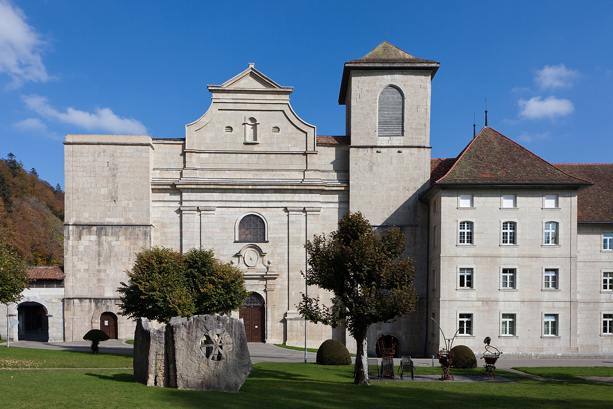 Ehemaliges Kloster (Abbatiale) in Bellelay